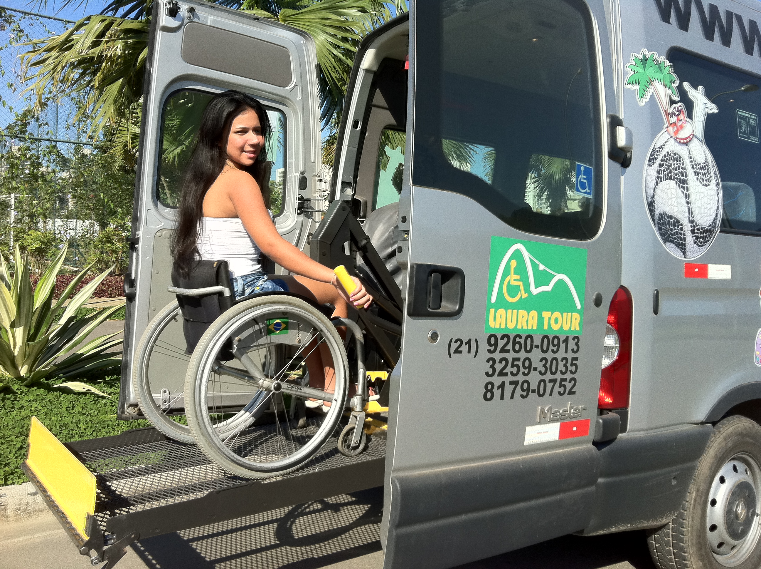 Laura Tour Turismo Inclusivo